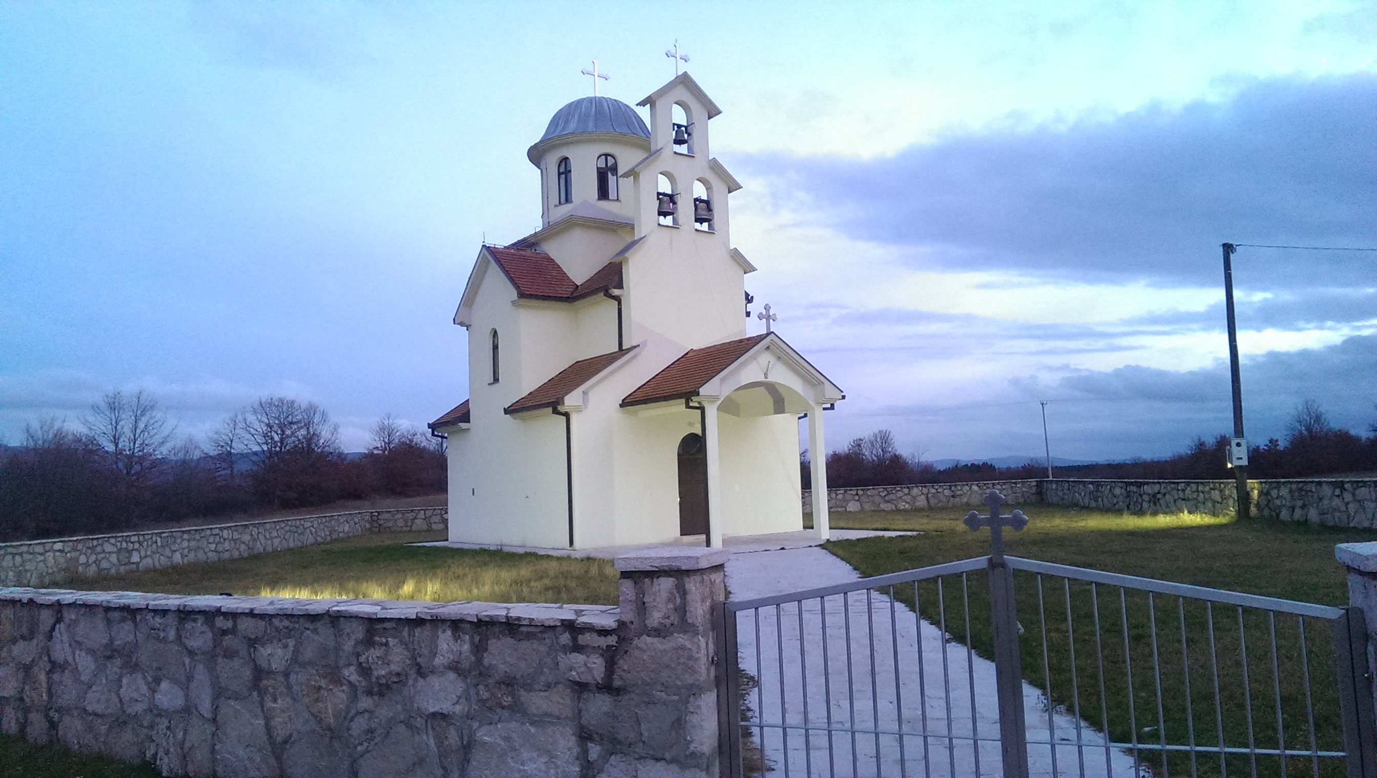 Црква Св. мученика Вукашина у Придворцима